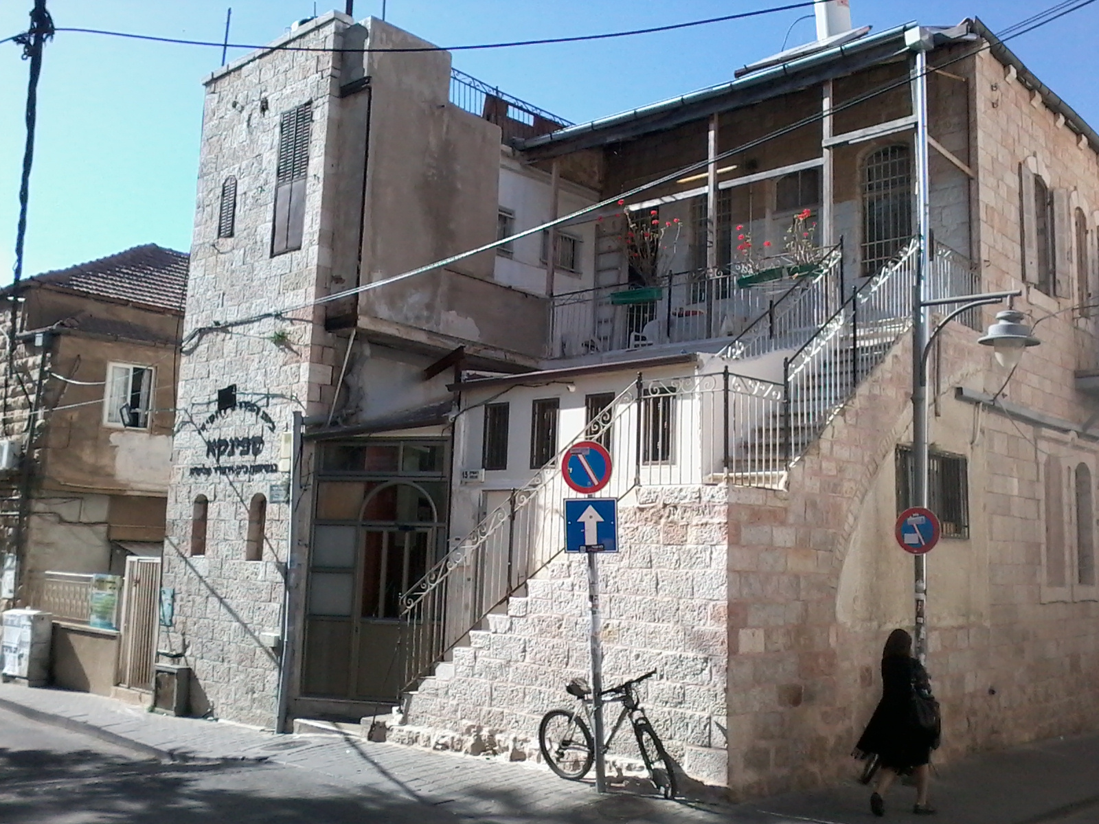 בניין בית המדרש של חסידות ספינקא בשכונת זכרון משה בירושלים